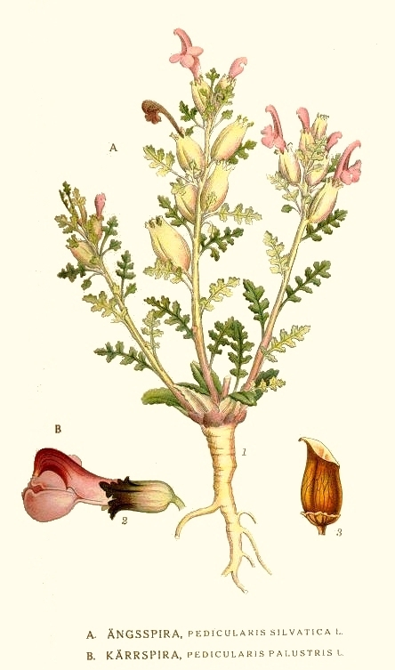 Pedicularis sylvatica L., Pedicularis palustris L. Original Description A. Ängsspira, Pedicularis sylvatica L. B. Kärrspira, Pedicularis palustris L.